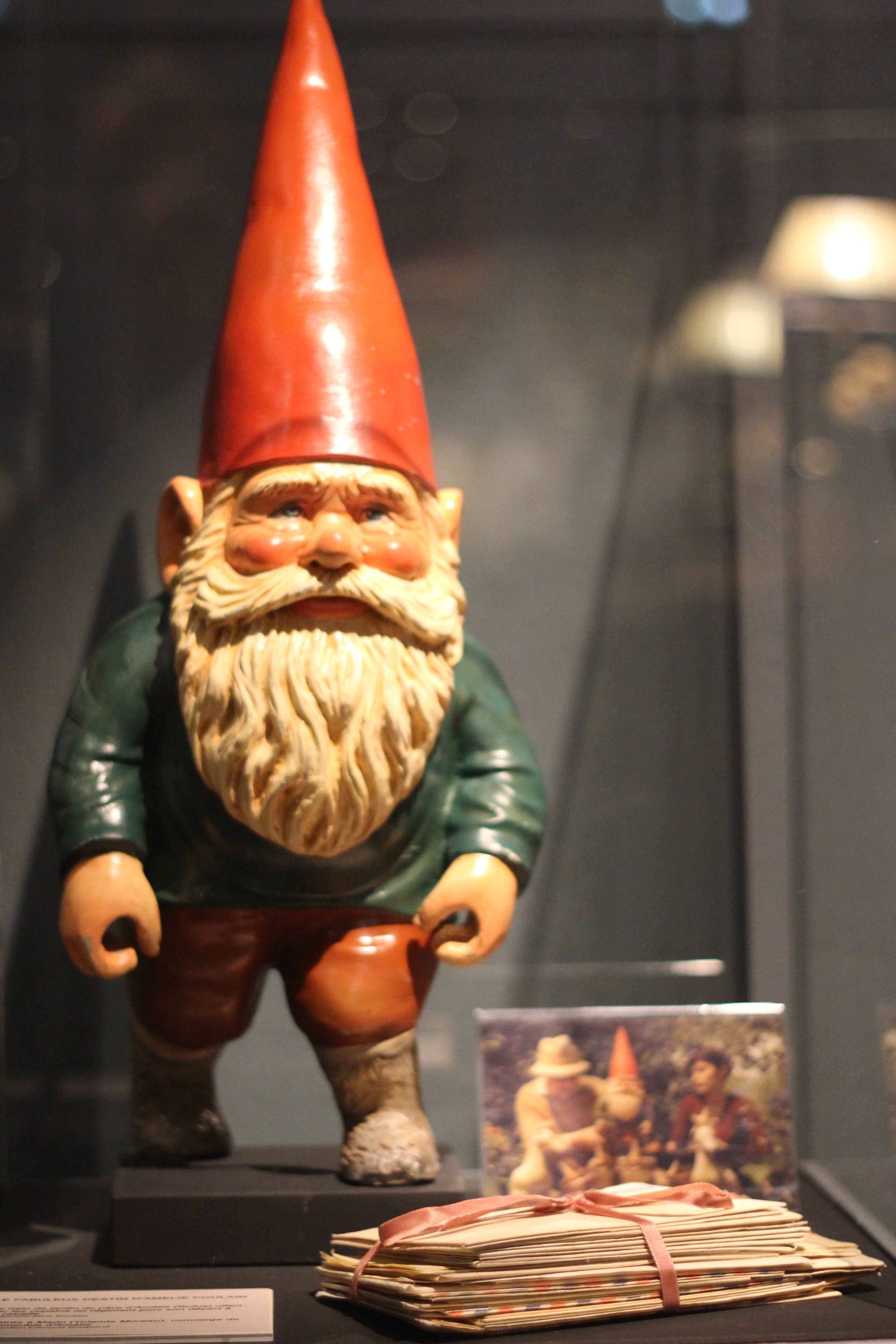 Nain de jardin utilisé dans le film Le Fabuleux Destin d'Amélie Poulain. Exposition "Caro/Jeunet" au musée Minature et Cinéma en 2018-2019.